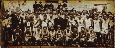 Corredores de la Media Maratón de Lima en la Plaza San Martín, 1928